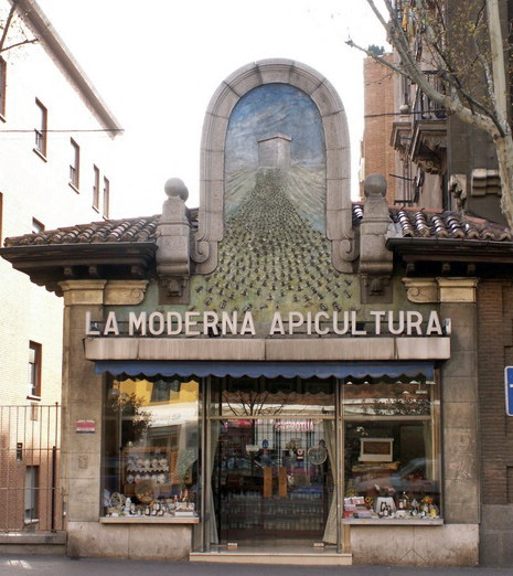 La Moderna Apicultura, tienda situada en la calle del Doctor Esquerdo, 45, de Madrid. En activo desde 1926.